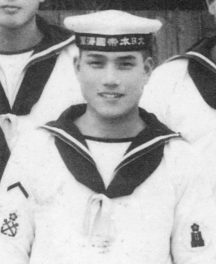 操縦練習生時代の豊島。